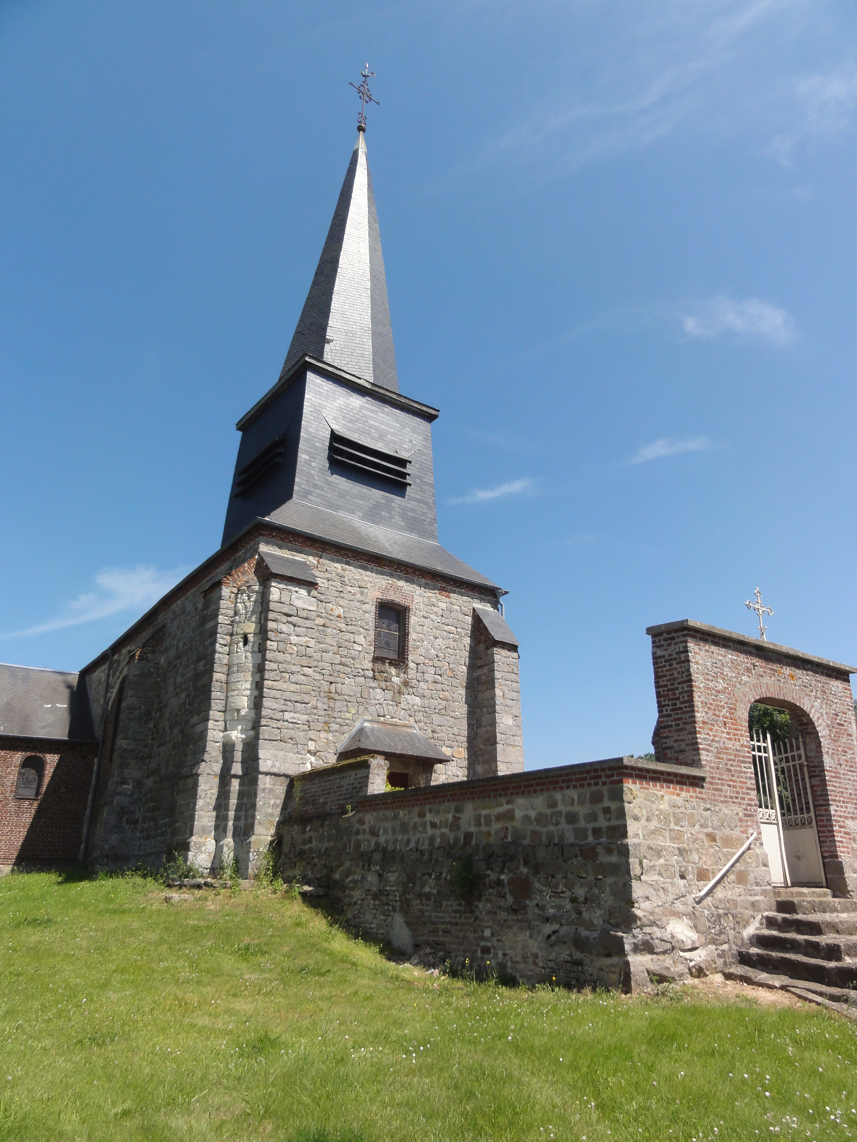 Châtillon-lès-Sons (Aisne) église